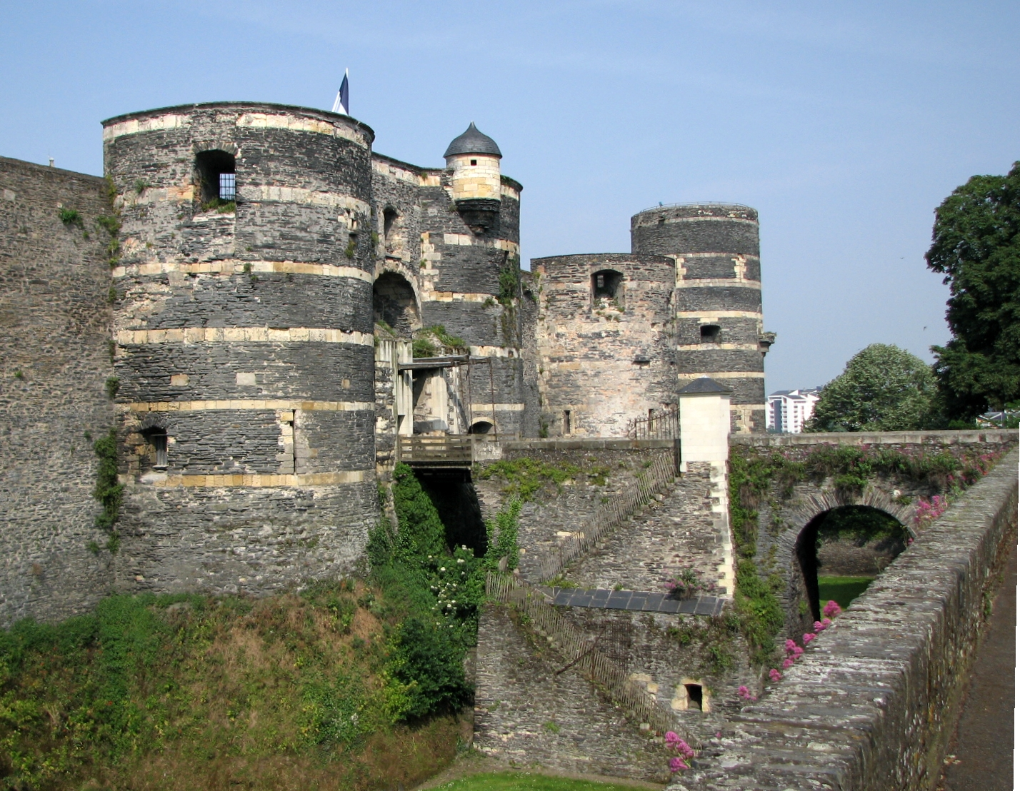 Château d'Angers It is indexed in the Base Mérimée, a database of architectural heritage maintained by the French Ministry of Culture, under the references IA49000839 and PA00108871.